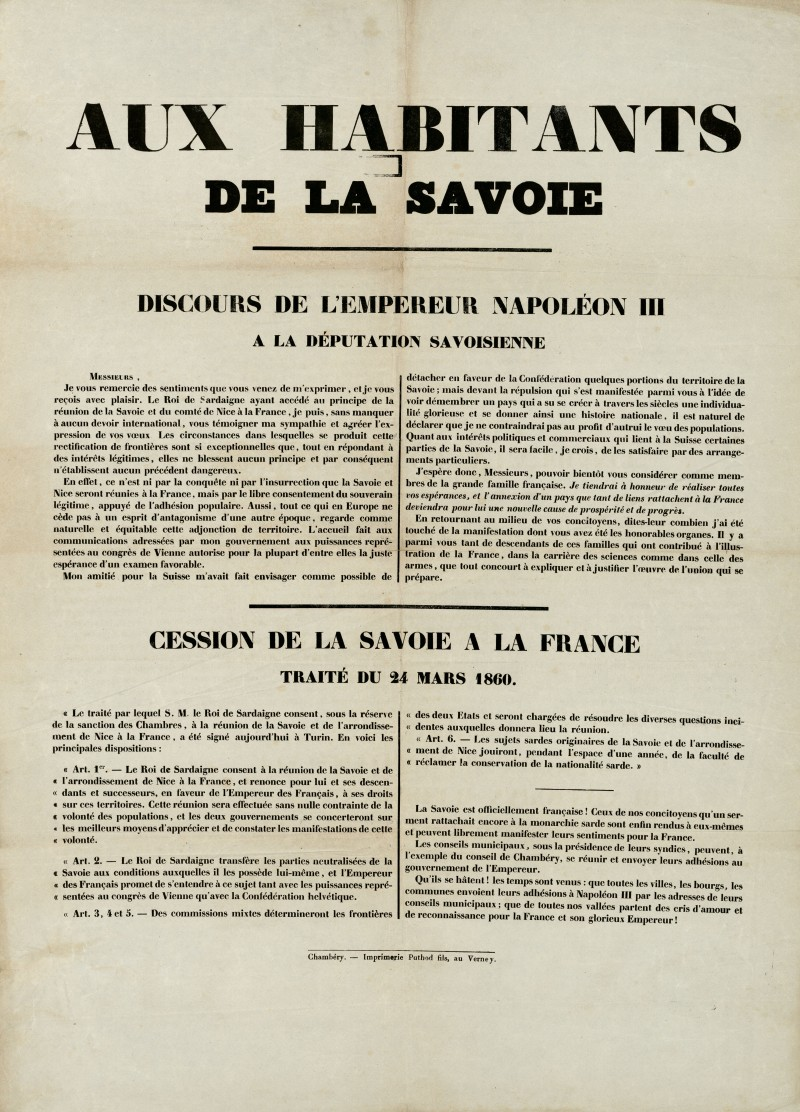 Discours de l'empereur français Napoléon III aux habitants de Savoie